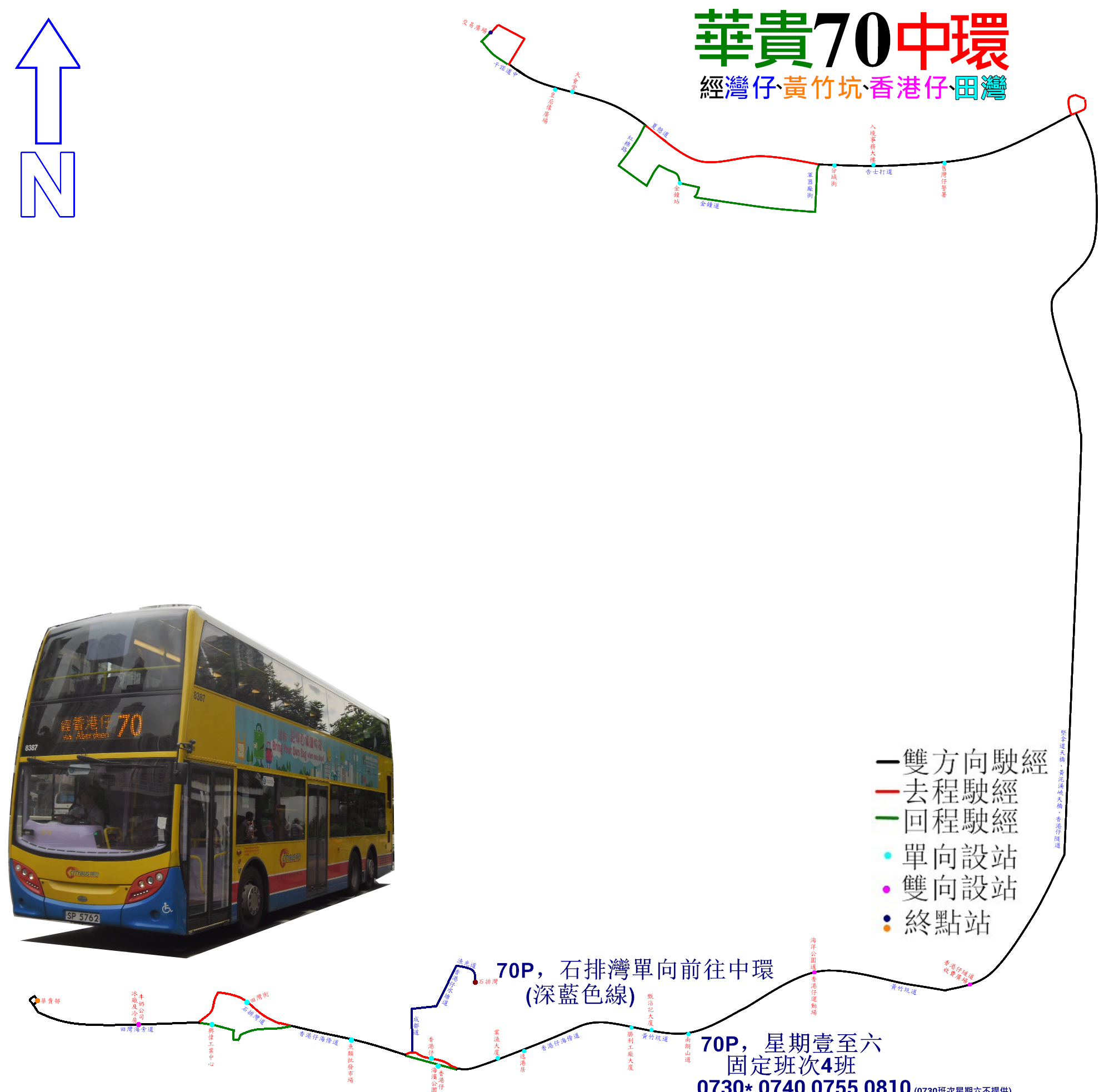 中文（香港）: 城巴70號線的走線圖